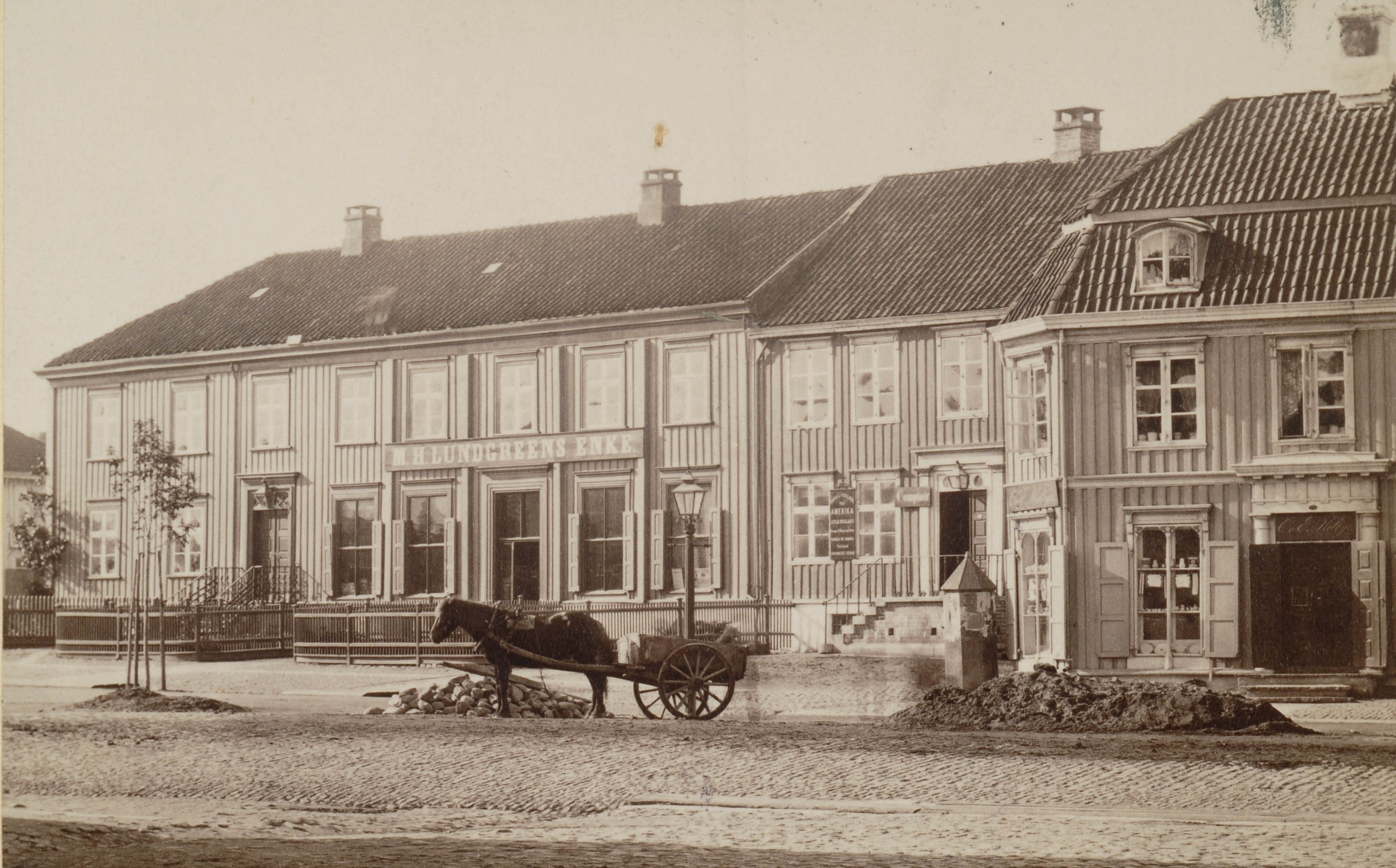 Lundgreengården og to nabohus. Lundgreengården hadde adresse Munkegata 26, nabohuset til høyre, Helsinggården, er nr. 28. Huset til høyre, er Munkegata 30-32. Lundgreengården var hjørnegård mot Kongens gate. I forgrunnen hest og vogn. Kjøpmann Mathias Helmer Lundgreen kjøpte Munkegata 26 i 1817. Han åpnet forretning i gården, denne ble under hans enke, Catharina Maria Lundgreen, f. Møllers ledelse opparbeidet til byens ledende vin- og kolonialforretning. Lundgreengården ble ca. 1860 utvidet med naboeiendommen Munkegata 28 som gikk under navnet Helsinggården. Gårdene ble revet i 1913 for å gi plass til Hotel Phoenix.